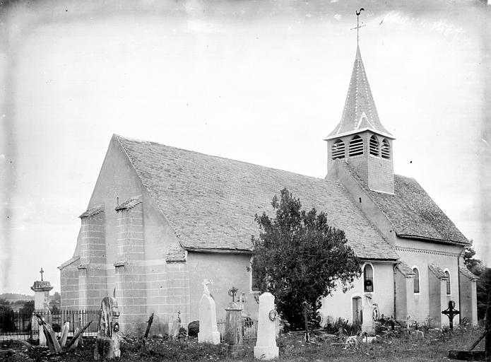 Ensemble sud-ouest